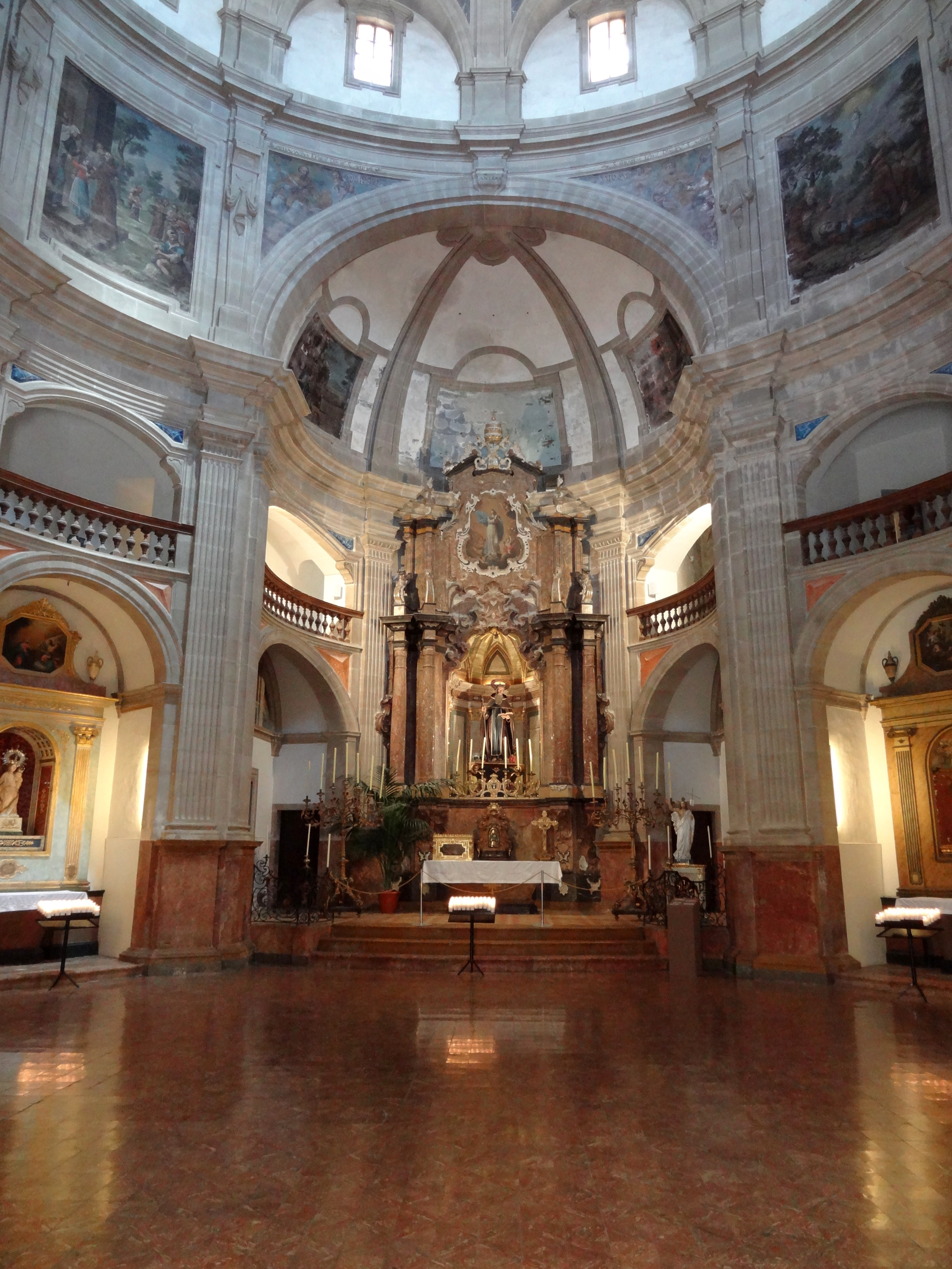 Innenraum der Kirche Sant Antoni des Viana in Palma, Mallorca, Spanien